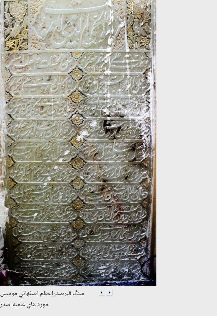 مرقد الصدر الأعظم في مدرسته في النجف الأشرف